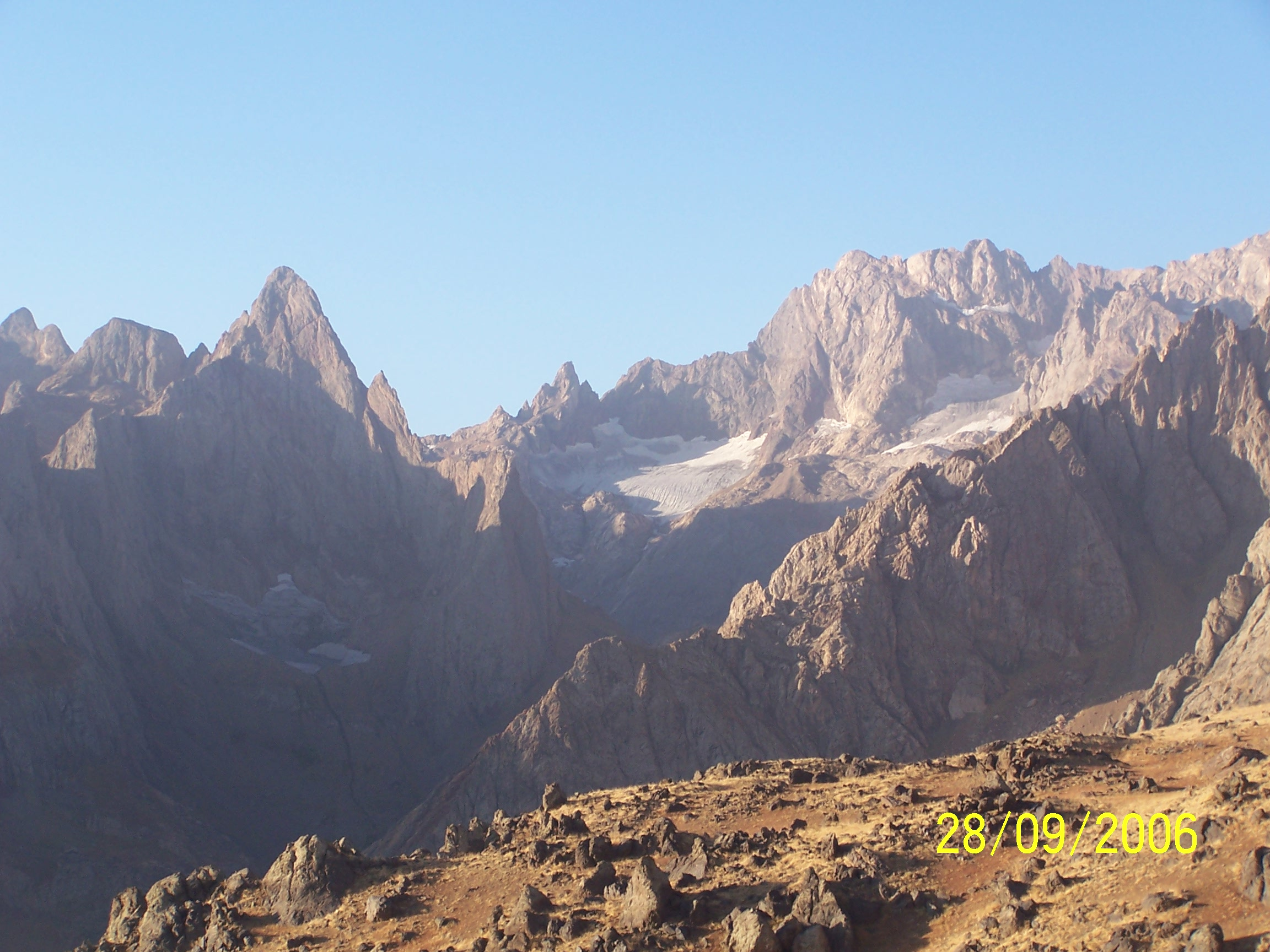 Cilo...